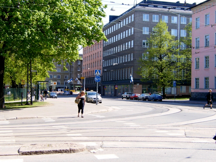 Helsinginkatu, Helsinki, the junction of Läntinen Brahenkatu